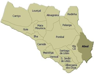 localisation de abiul sur la freguesia de pombal